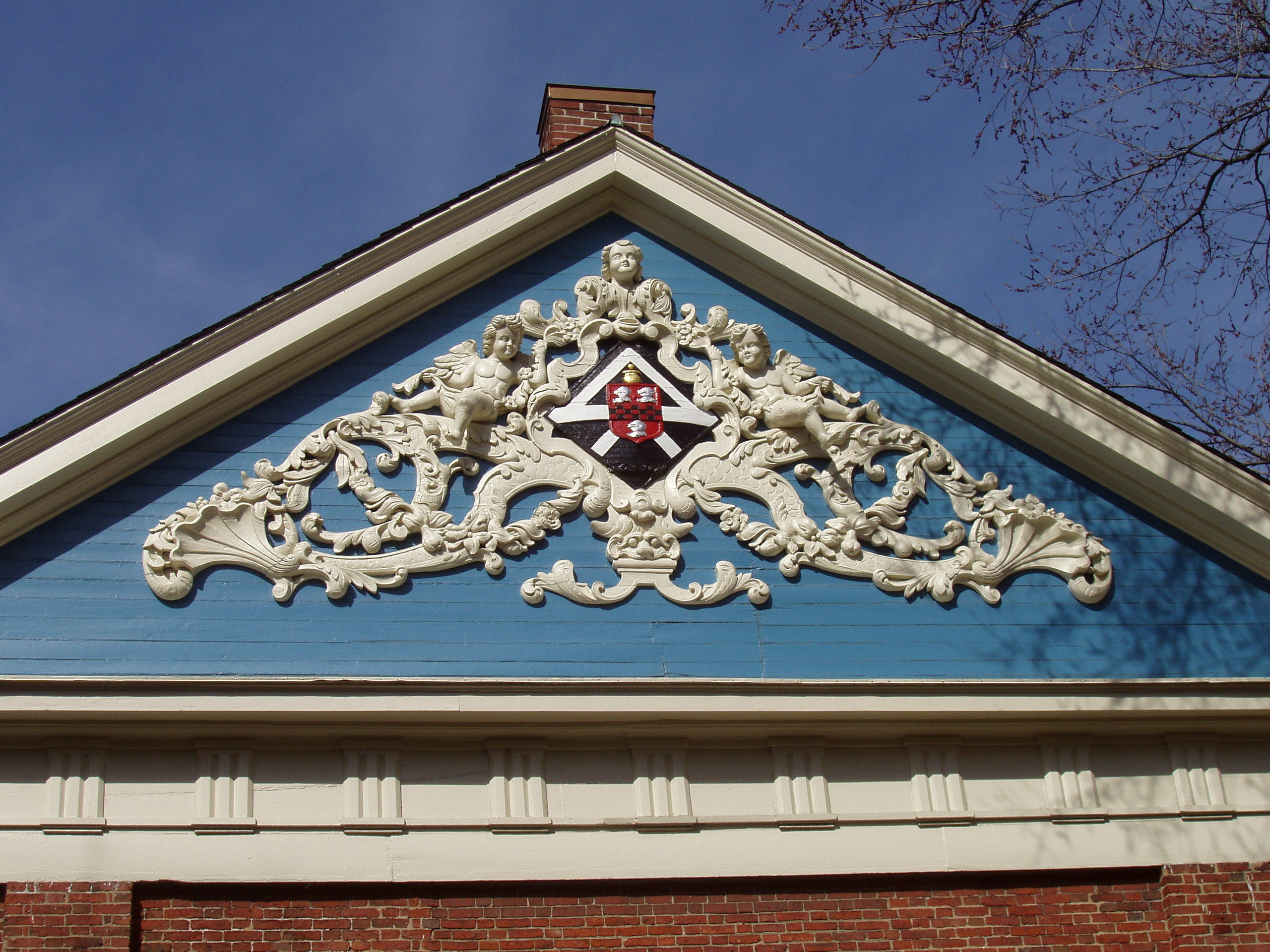 Holden Chapel detail, Harvard University, Cambridge, Massachusetts, USA.